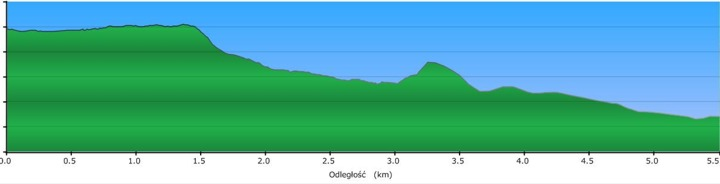 szlak turystyczny